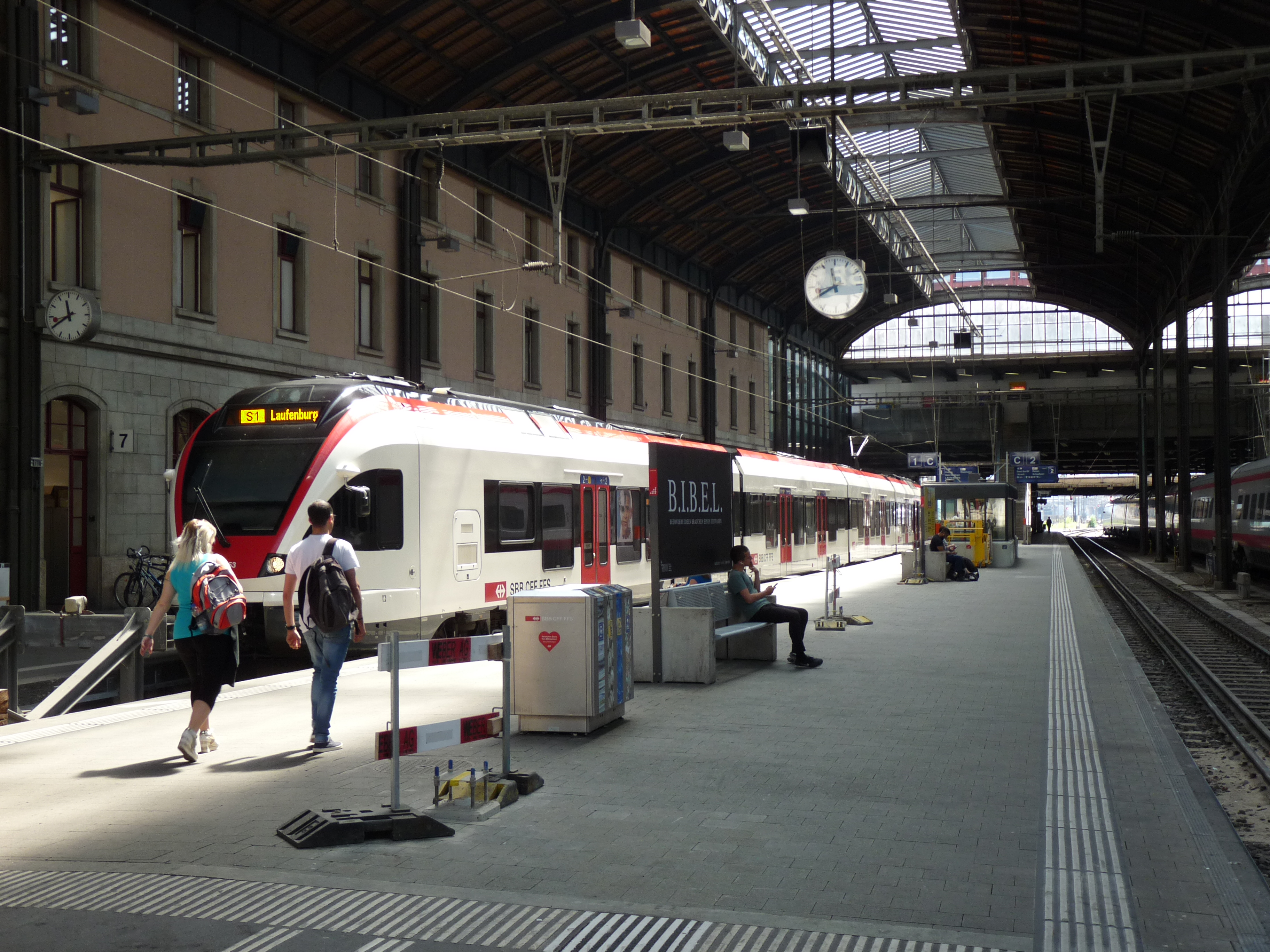 Trein in Bazel, Zwitserland